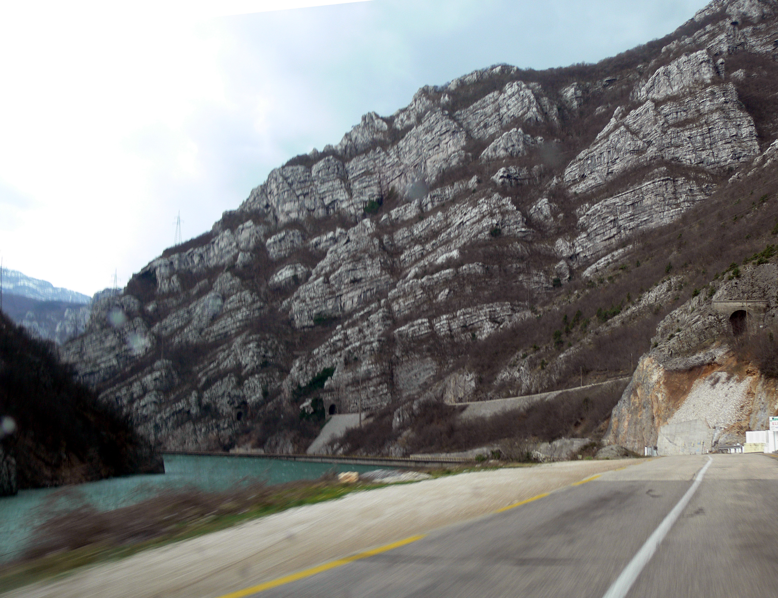 The lake Jablaničko Jezero near the road Sarajevo - Mostar, in Bosnia and Herzegovina.